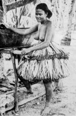 A Tuvalu woman 1894